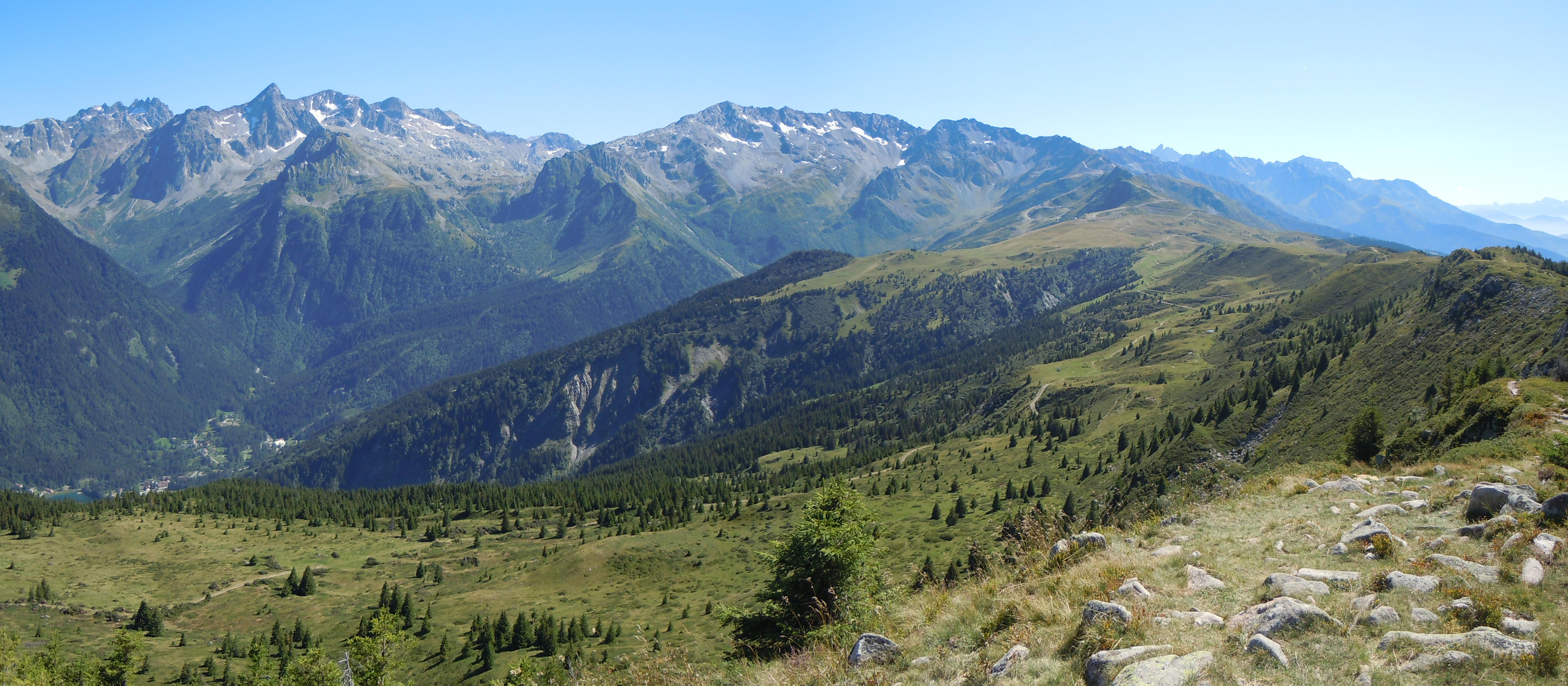 Massif des Sept-Laux depuis le Grand Rocher - allevan - Isère - France